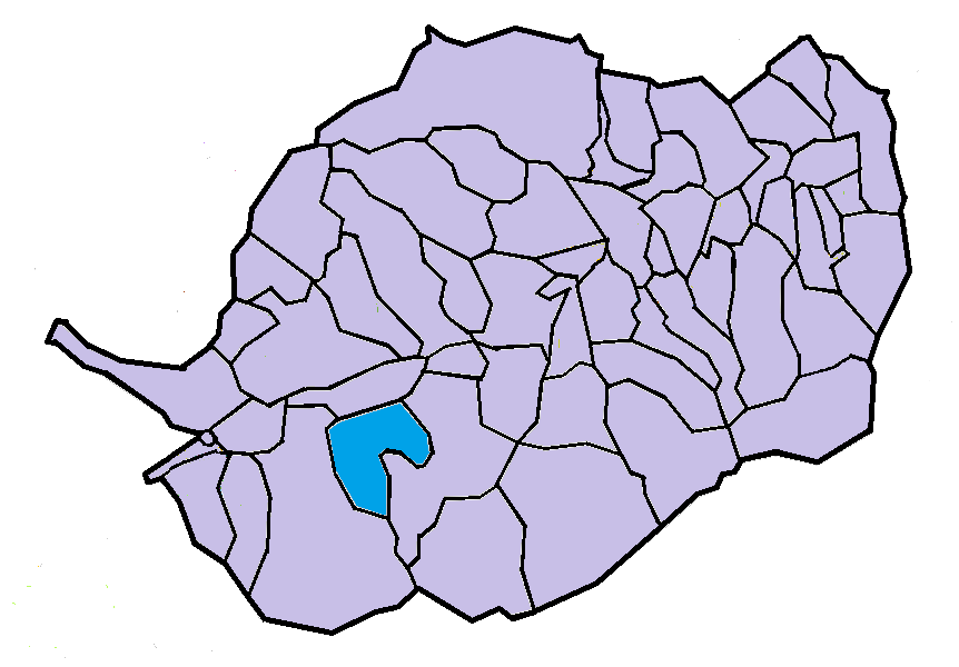 Toès i Entrevalls en el Conflent, a partir del mapa municipal del Conflent de lliure disposició adaptat al Nomenclàtor toponímic aprovat el 2007